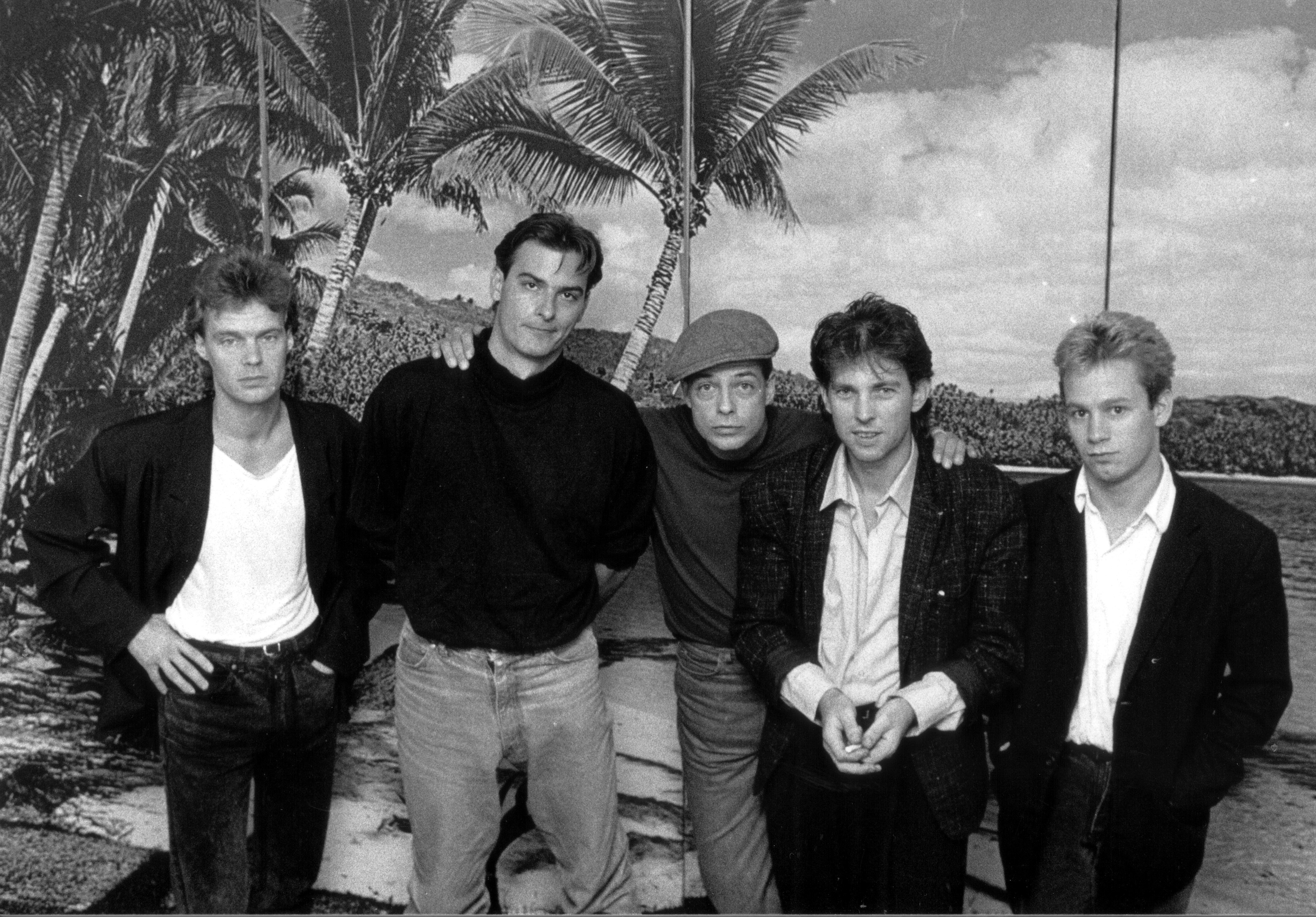 in de kleedkamer in de HBO soos in Nijmegen. vlnr: Ted de Best, Jan van Woezik, Toon Jansen, Ruud de Groot, Bart-Jan Baartmans